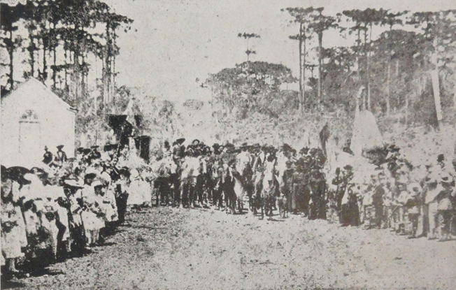 Primitiva capela de São Pelegrino em Caxias do Sul, fundada por Rafael Buratto e sua esposa Amália Sartori em 1891 com uma imagem doada por Salvador Sartori. A imagem mostra a recepção de dom Diogo Laranjeira em 24 de abril de 1898 oferecida pelos comitês da Federação Católica, os alunos da escola da professora Maria Traslatti e a família Sartori-Buratto, também com a participação da Banda Ítalo-Brasileira.